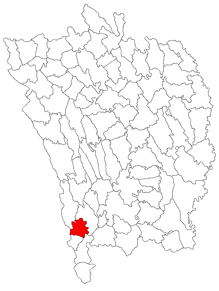 Categorie:Hărţi ale judeţului Vaslui